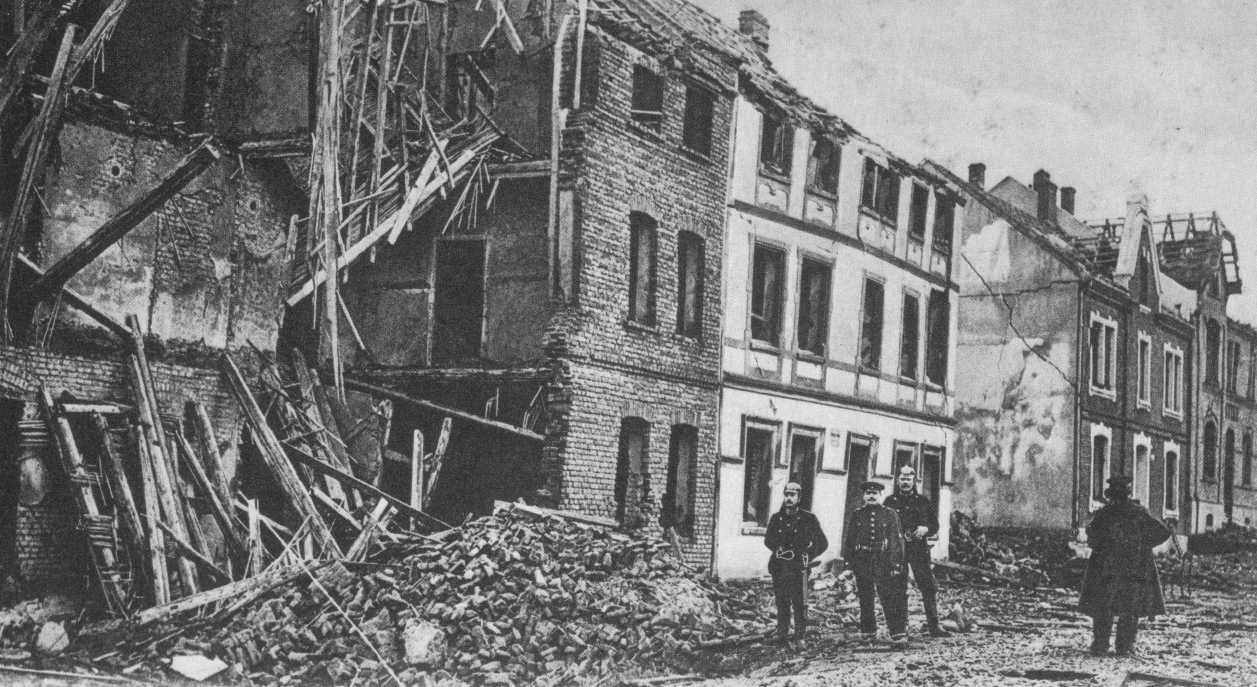 Schäden in Witten nach der Explosion der Roburit-Fabrik am 28. November 1906